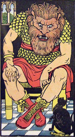 Гравюры по рисункам Крейна к сказке "Кот в Сапогах"